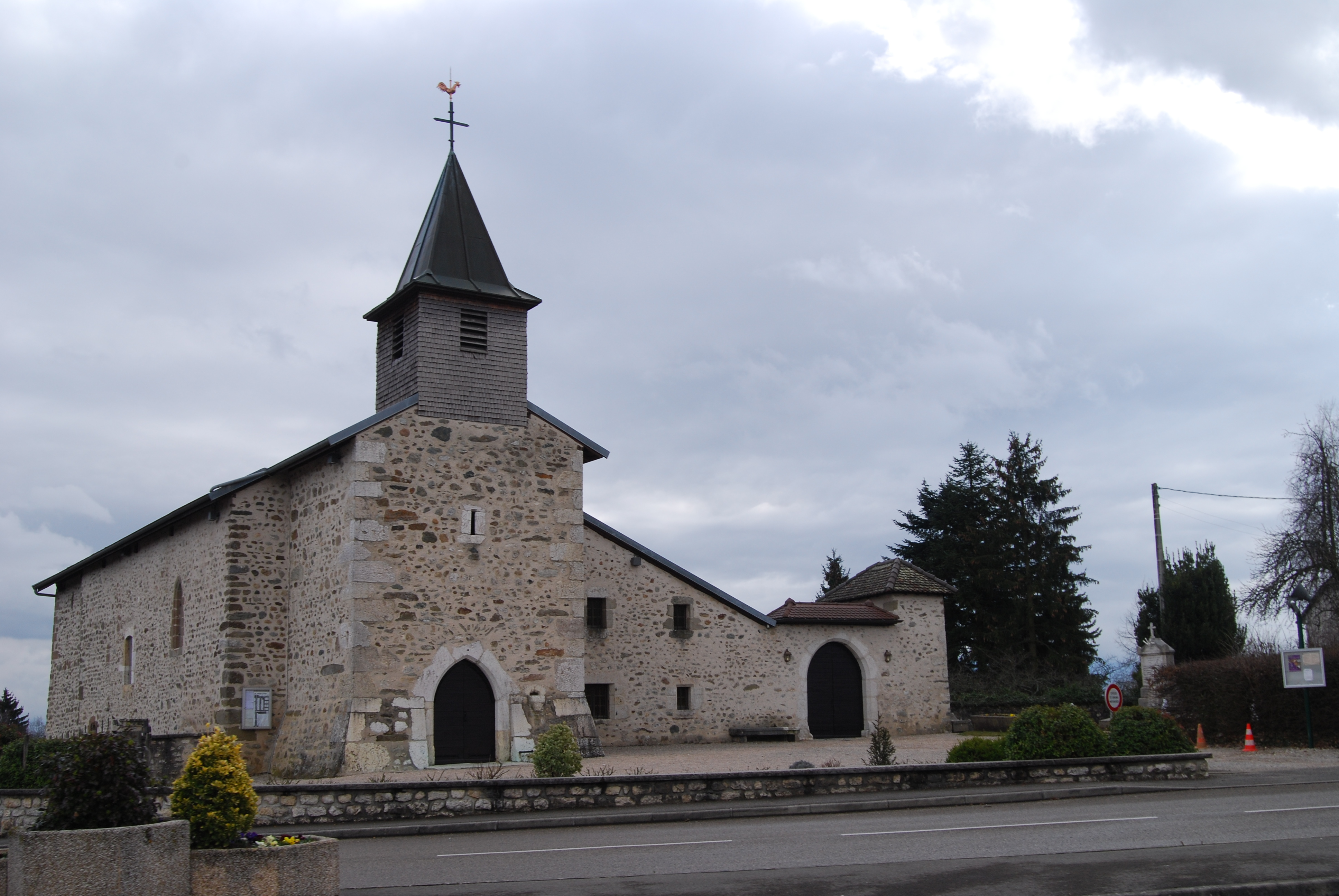 Eglise d'Ornex, Ain, France